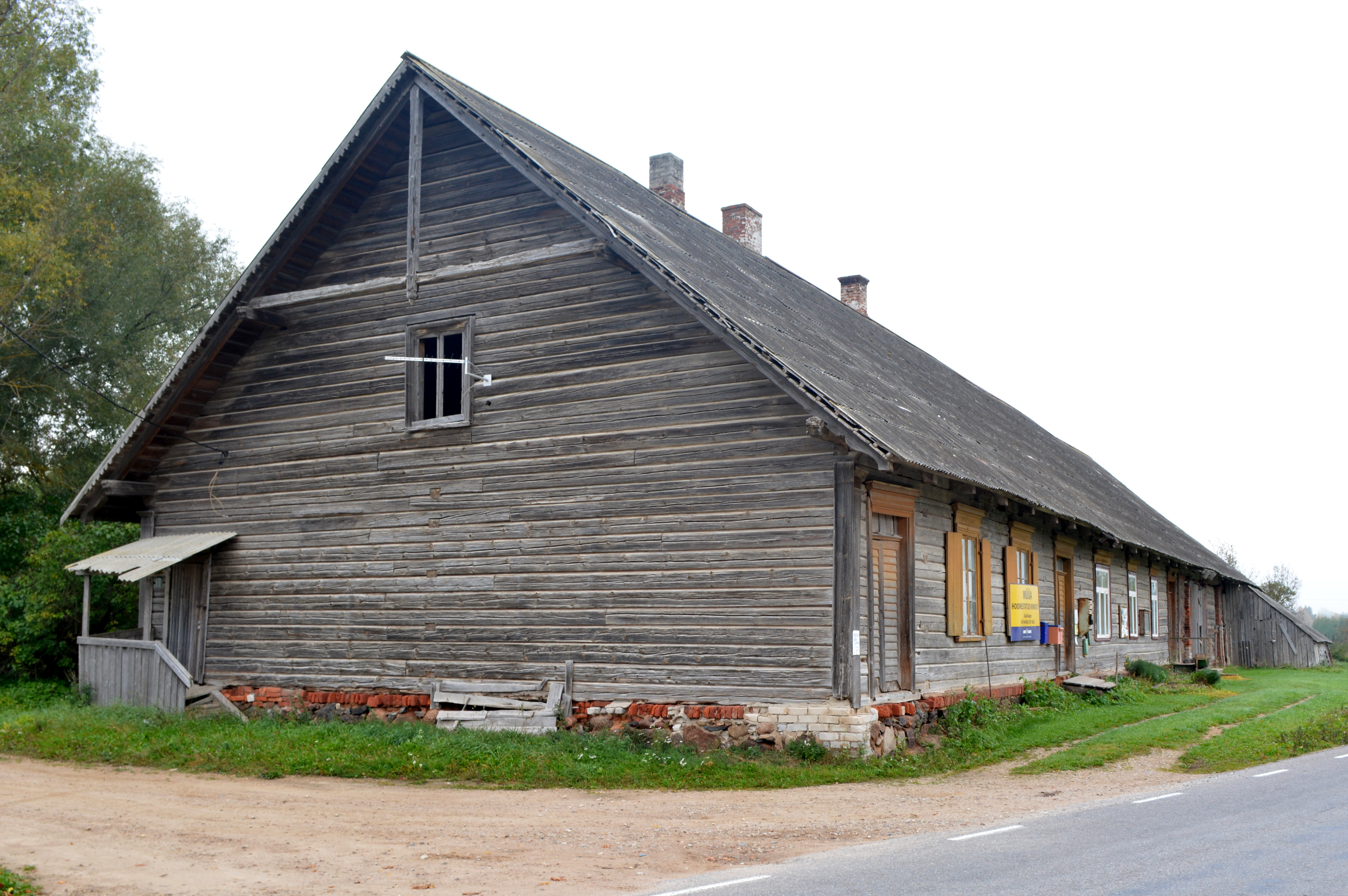 Kärsa kõrts